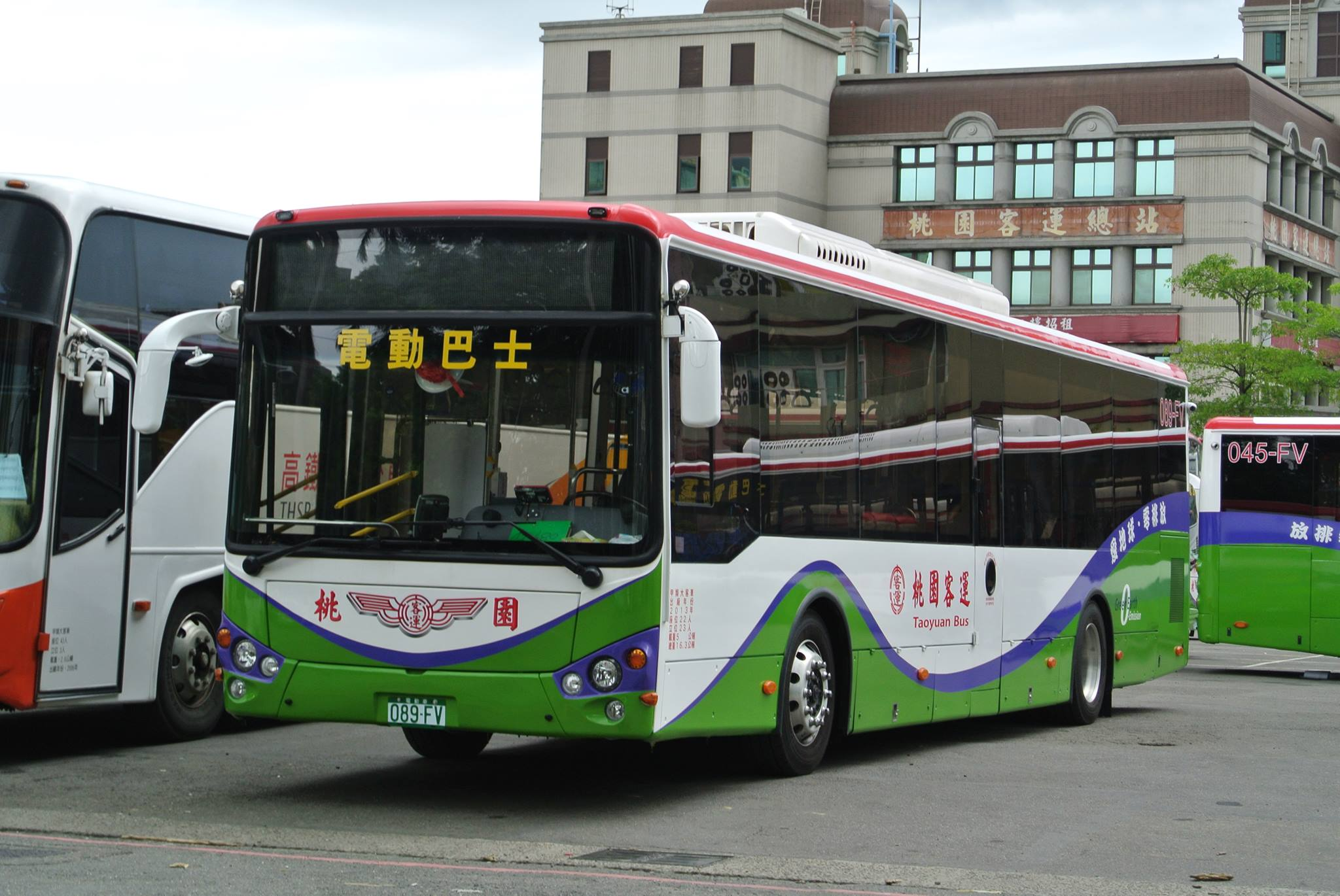 2013年桃園客運立凱電低地板巴士089-FV，停在桃園客運總站。本車款車頭已改為紅色，本圖為出廠時原始塗裝。